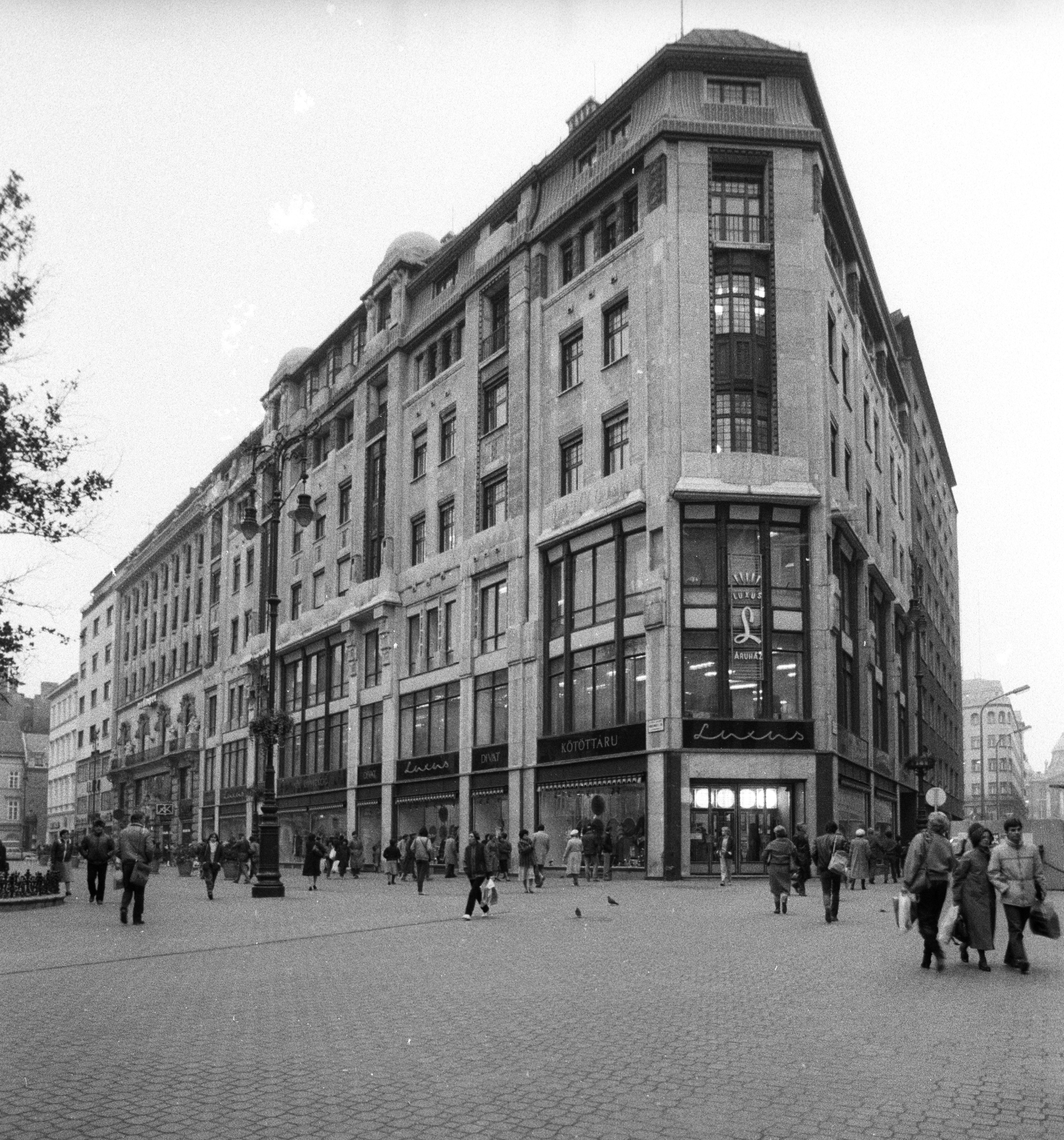 Vörösmarty tér, Luxus Áruház. Location: Hungary, Budapest V. Tags: Budapest Title: Vörösmarty tér, Luxus Áruház.